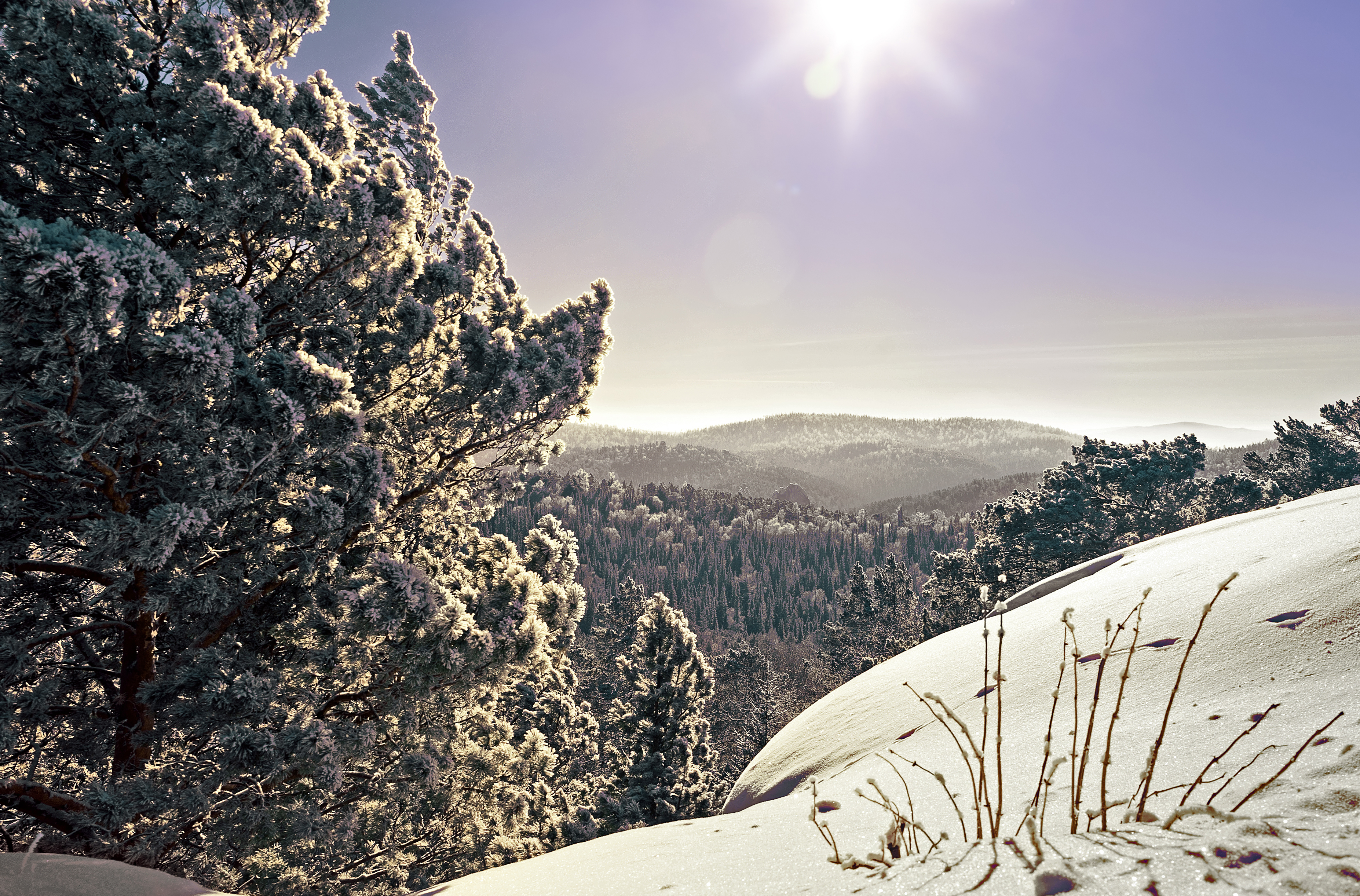 Столбы заповедник, Березовский район This image is related to the protected area of Russia number 2400031